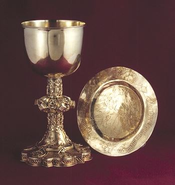 Ejbyn (Särkilahden) kalkki ja pateeni. Kalkin jalka on tehty Turussa 1480-luvulla, malja uusittu Tanskassa 1851.